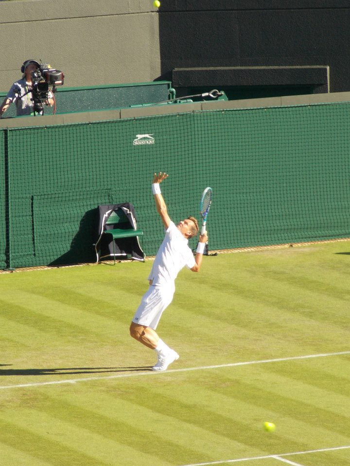 Tomas Berdych a Wimbledon 2015